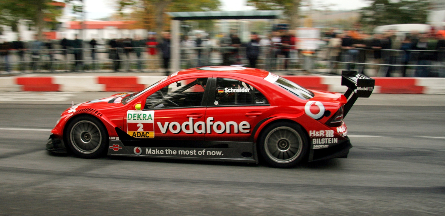 DTM car Mercedes-Benz AMG 2006 (C-Class, W203), Bernd Schneider (driver)